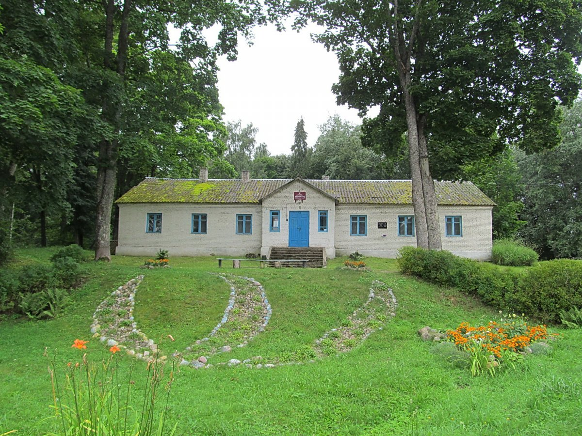 Забалоцце (Перабродскі сельсавет). Сядзіба Дмахоўскіх